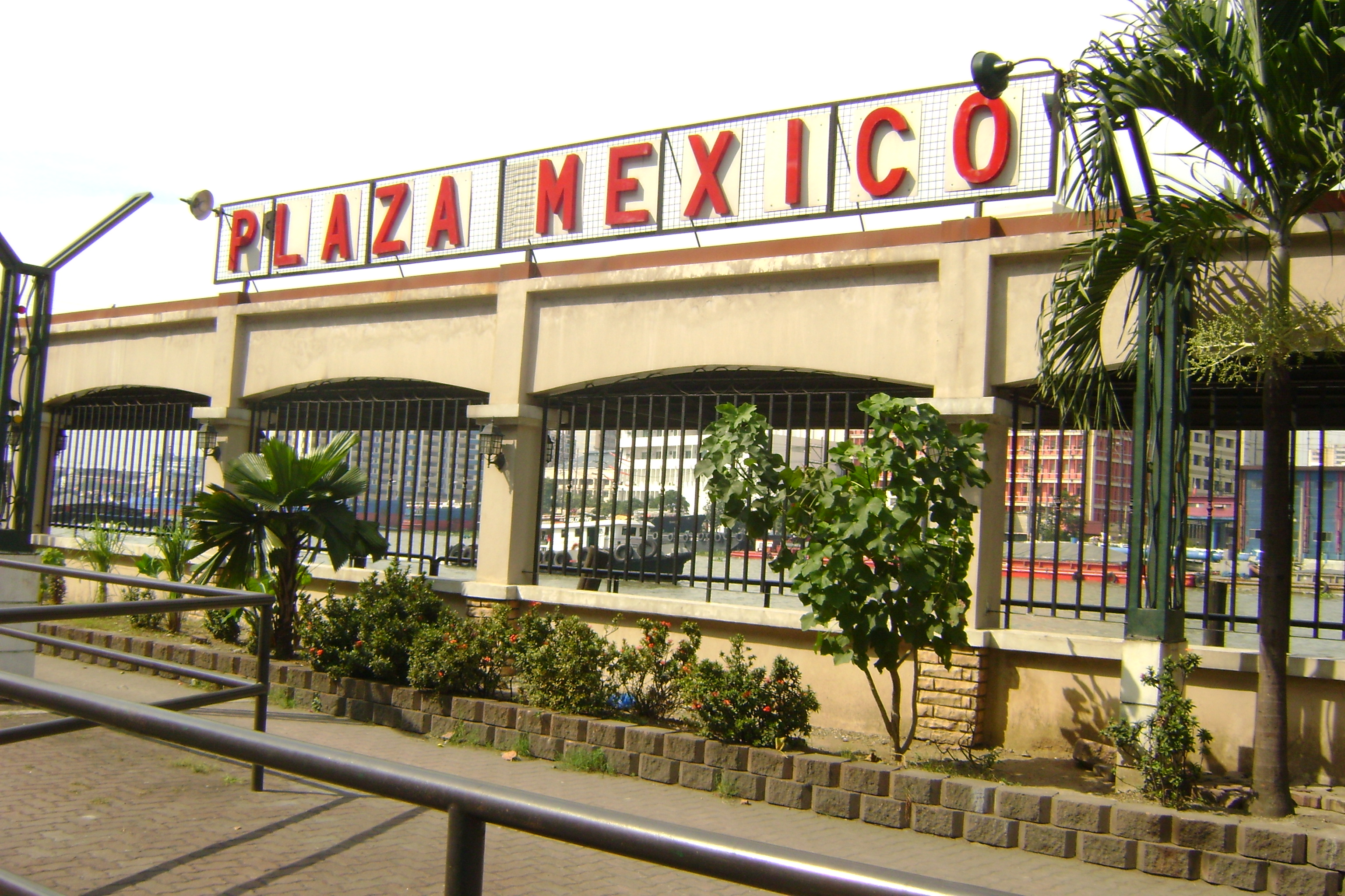 Plaza Mexico in Manila, Philippines